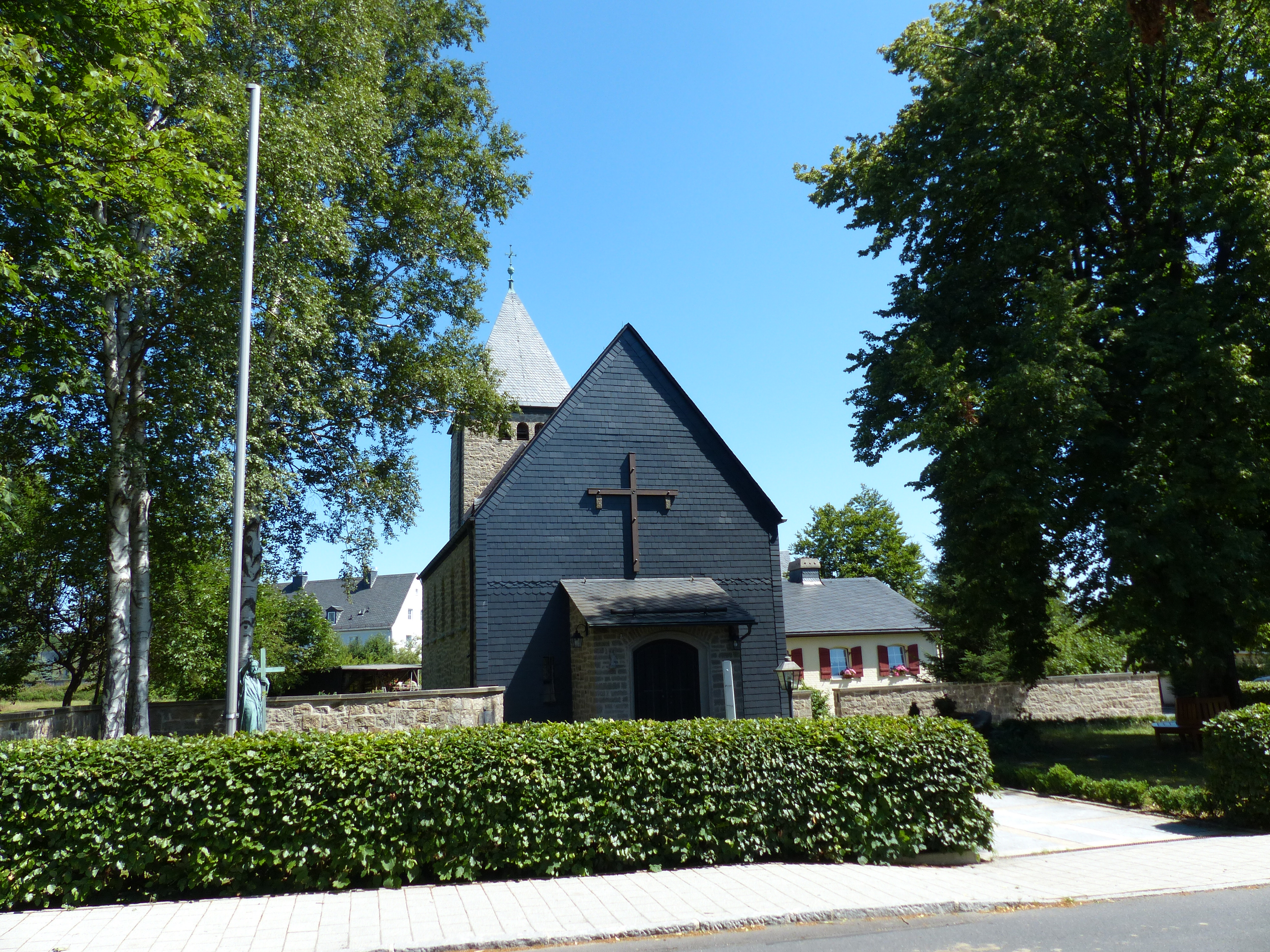 Bauwerk in Weißenstadt